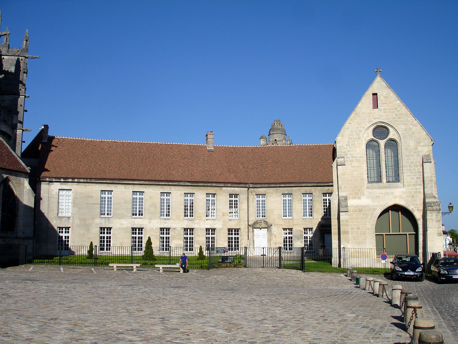 Le palais épiscopal à Senlis, Oise, France. Il abrite le musée d'Art et d'Archéologie.